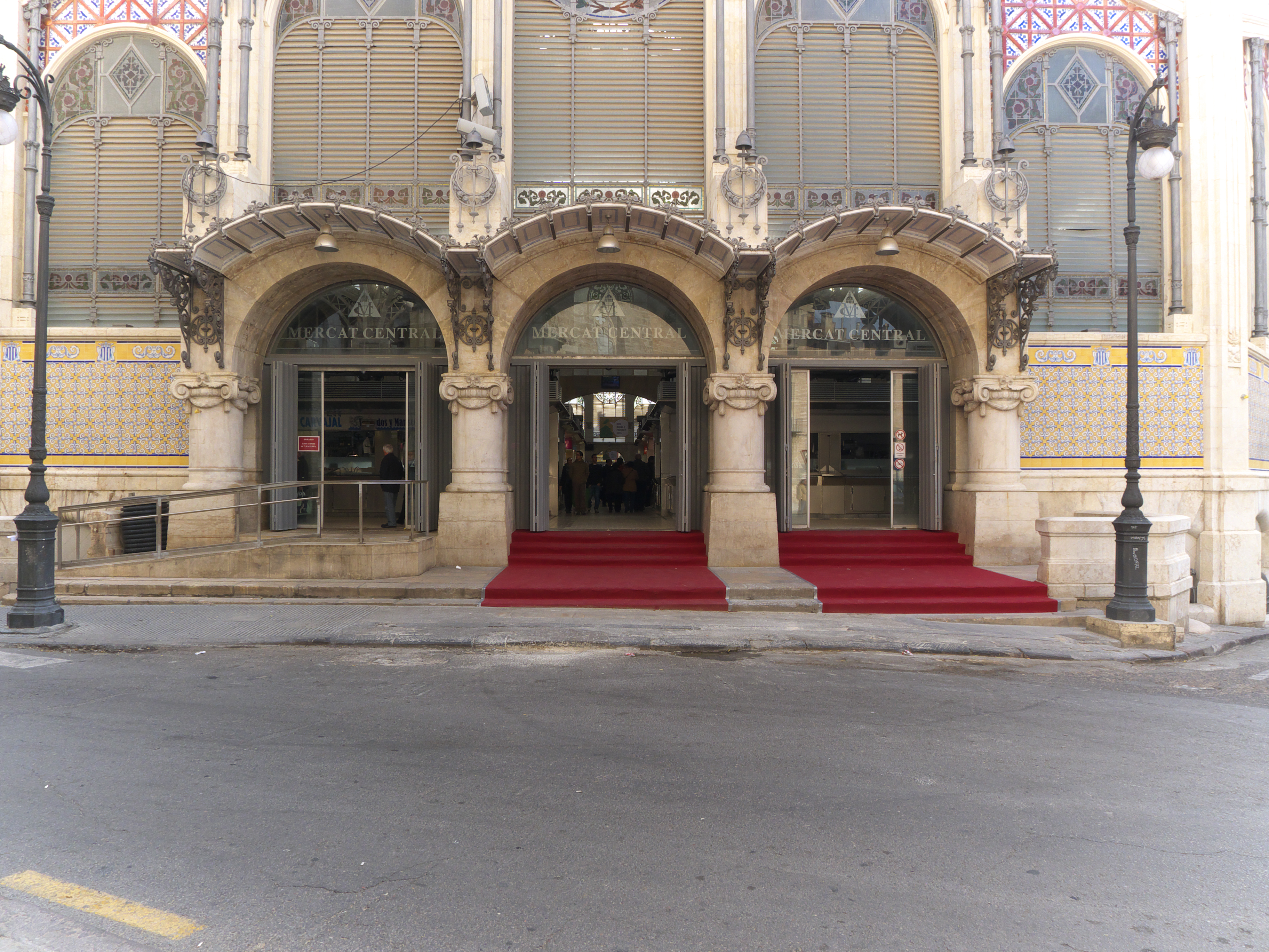 Francisco Guardia Vial y Alejandro Soler March (1914)